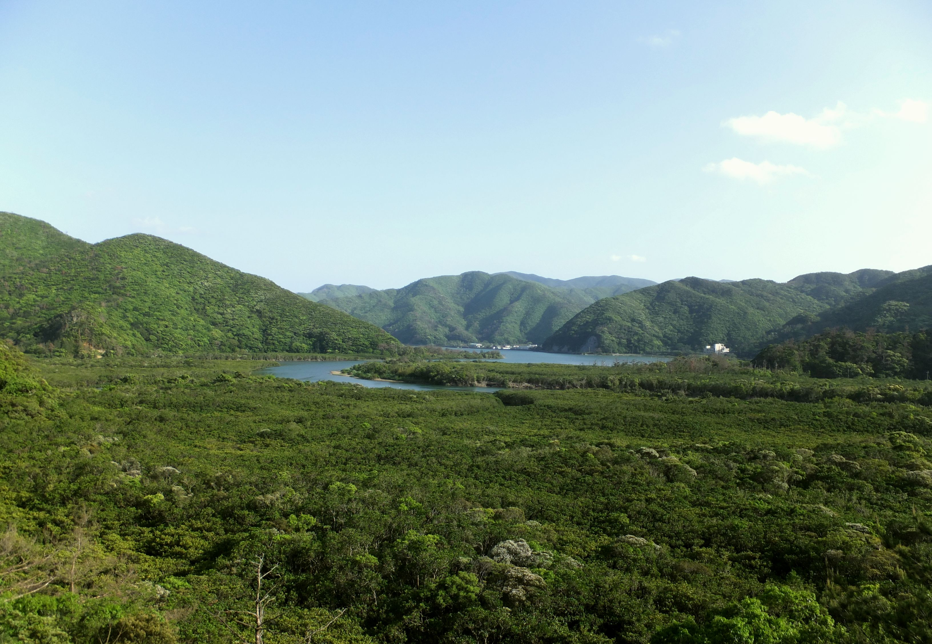 奄美群島国立公園特別保護地区 鹿児島県奄美大島 蛭木／漂木(ヒルギ）科原生林群